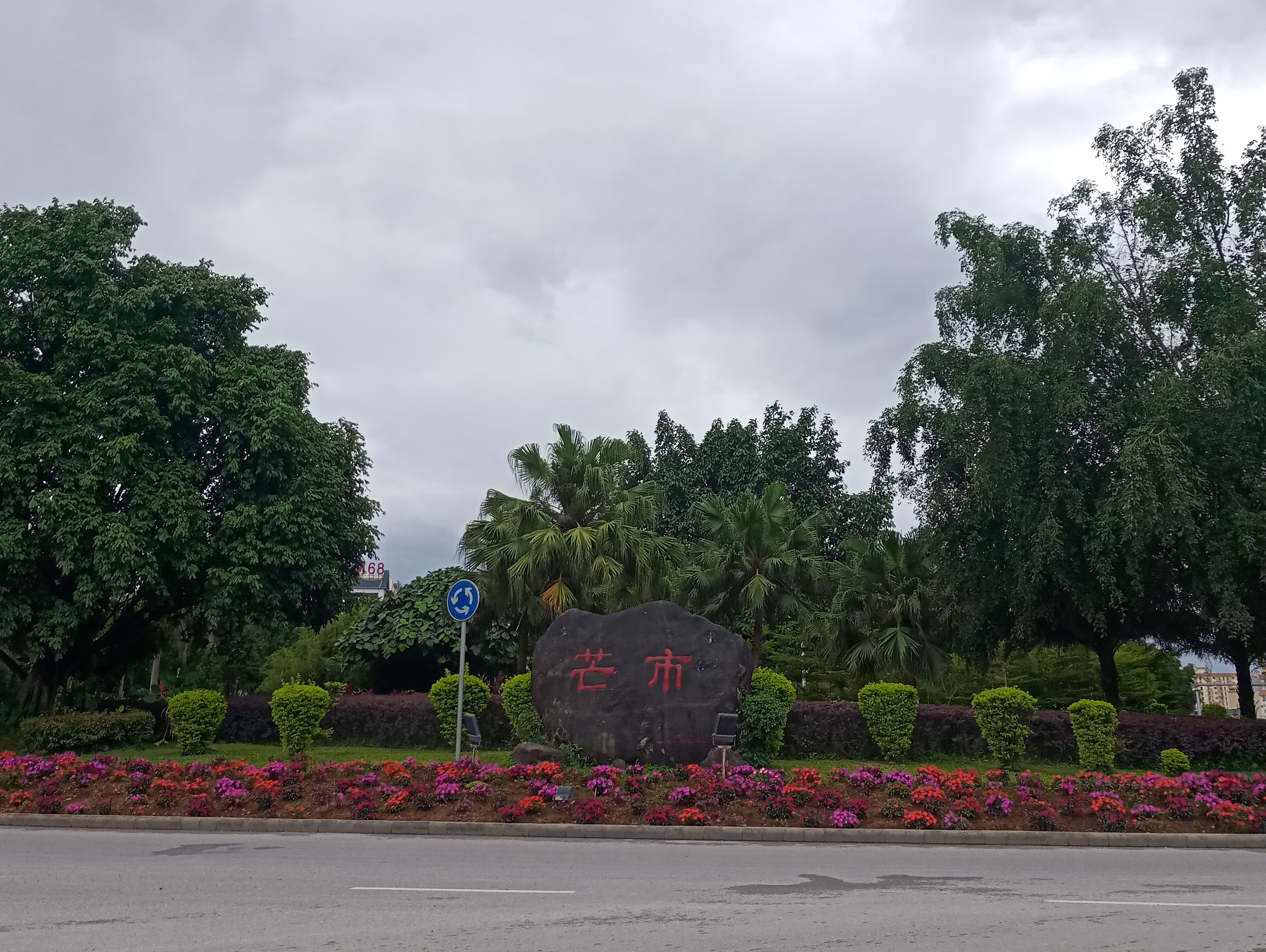 “芒市”城市门牌石